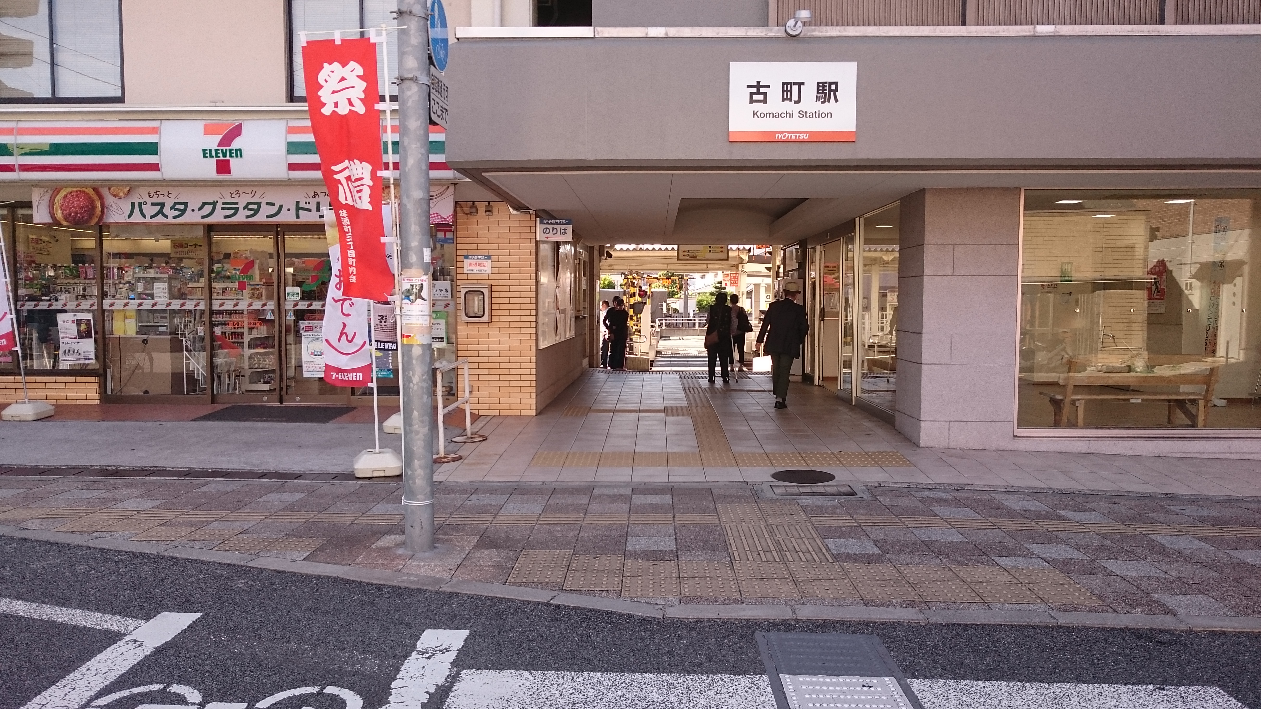 古町駅の外観